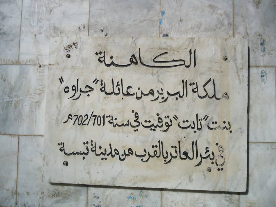 ملكة البربر الكاهنة دهية ببلدية بغاي خنشلة